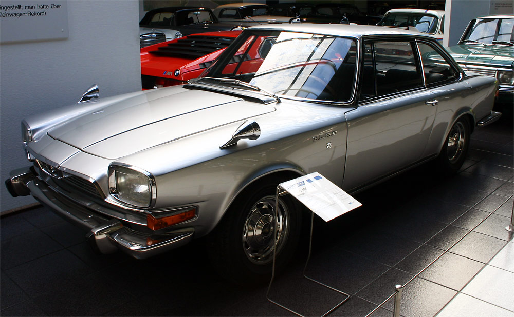 Glas 2600 V8 Coupe Fotografiert von Softeis, am 3.10.2004 im EFA-Museum für Deutsche Automobilgeschichte first upload in de wikipedia on 01:24, 5. Okt 2004 by Softeis